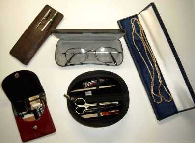 Verschiedene Etuis: Brillenetui, Nageletui, Etui mit Nähzubehör, Schmucketui. - Foto von Wela49 - Public domain